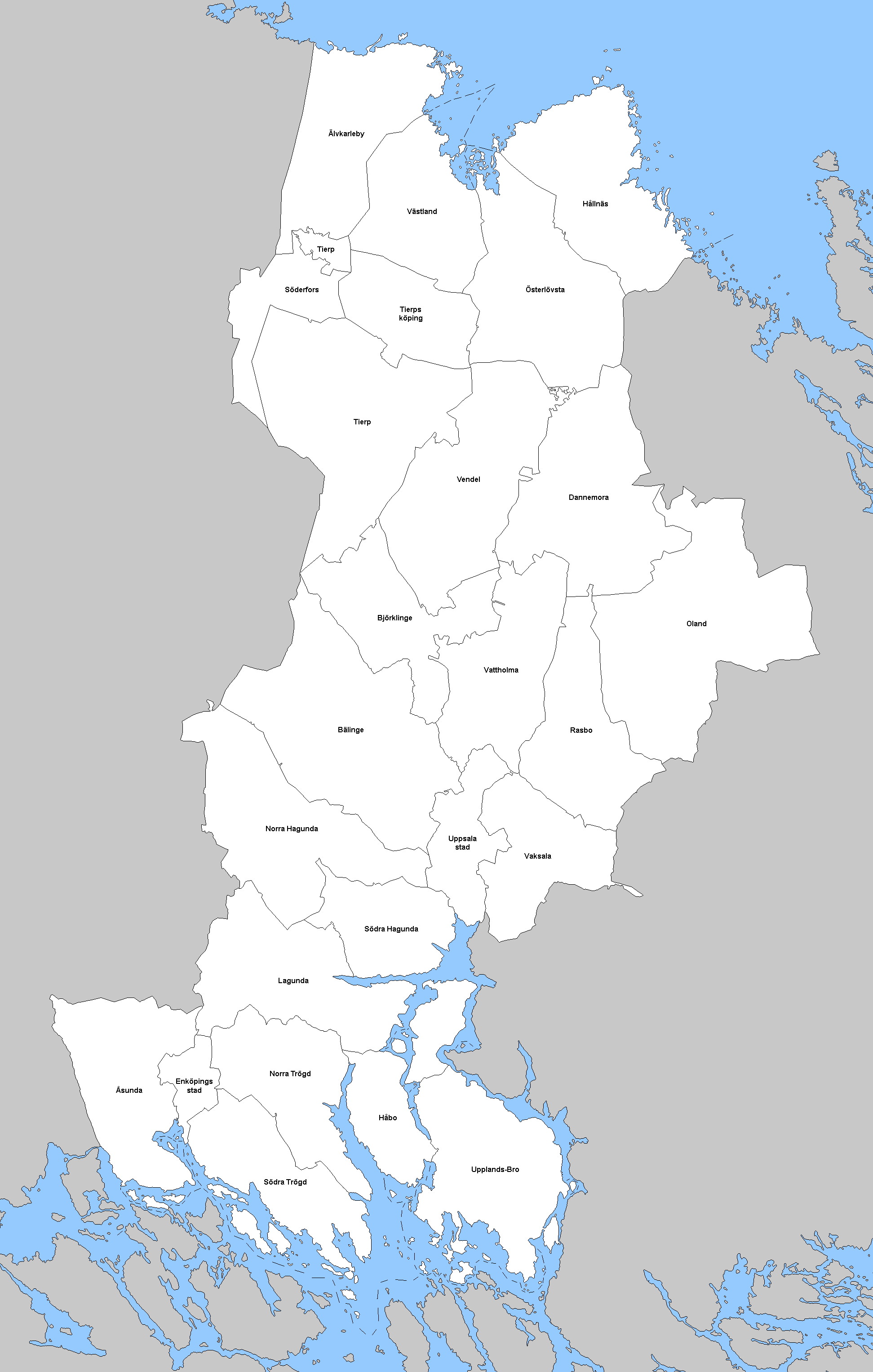 Kommunerna i Uppsala län den 1 januari 1952